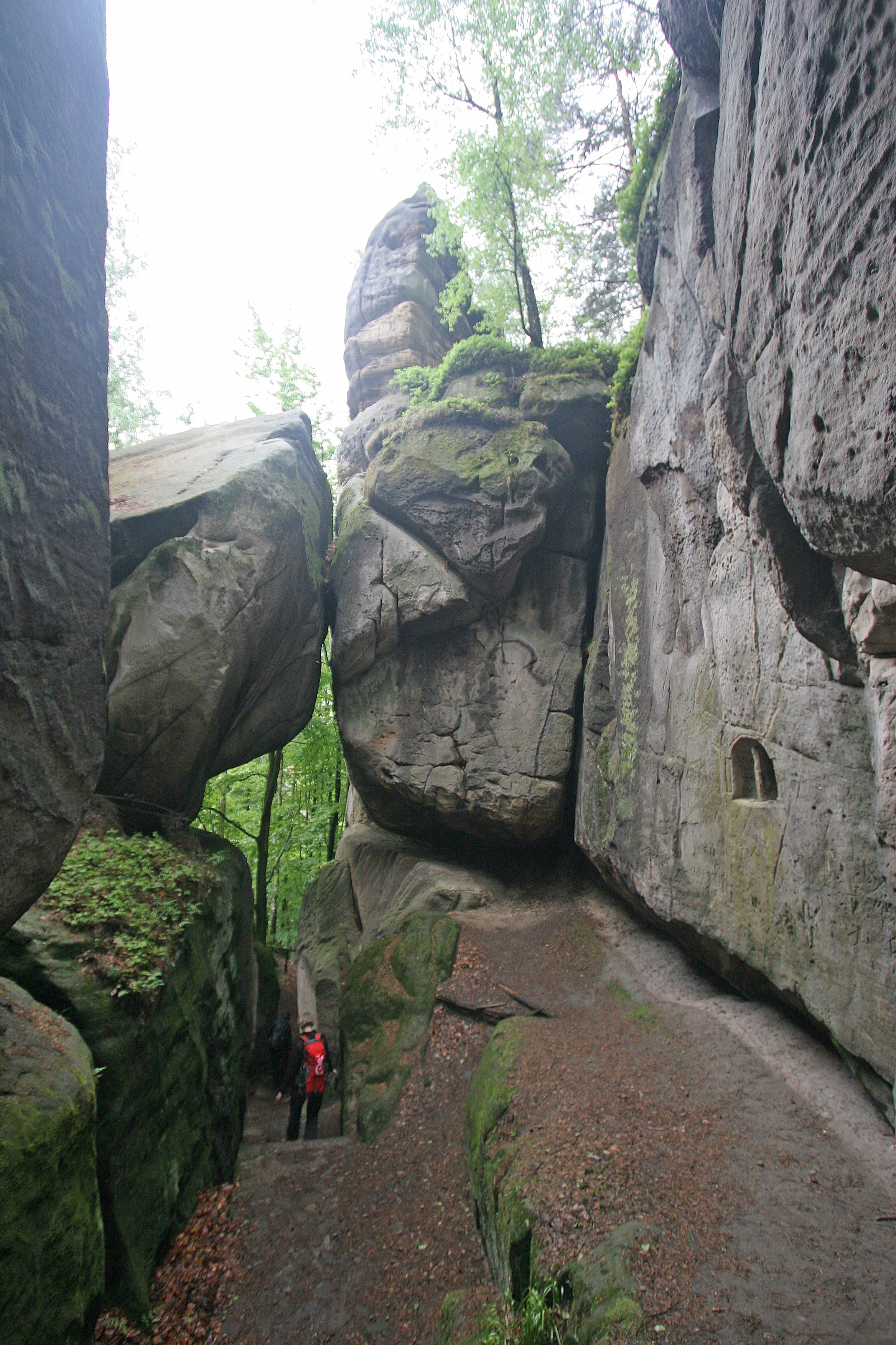 PR Klokočské skály - Klokočské průchody Project: Chráněná území.